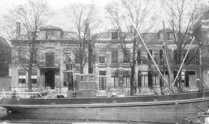 Een van de schepen van Rederij Stânfries aan de Willemskade in Leeuwarden